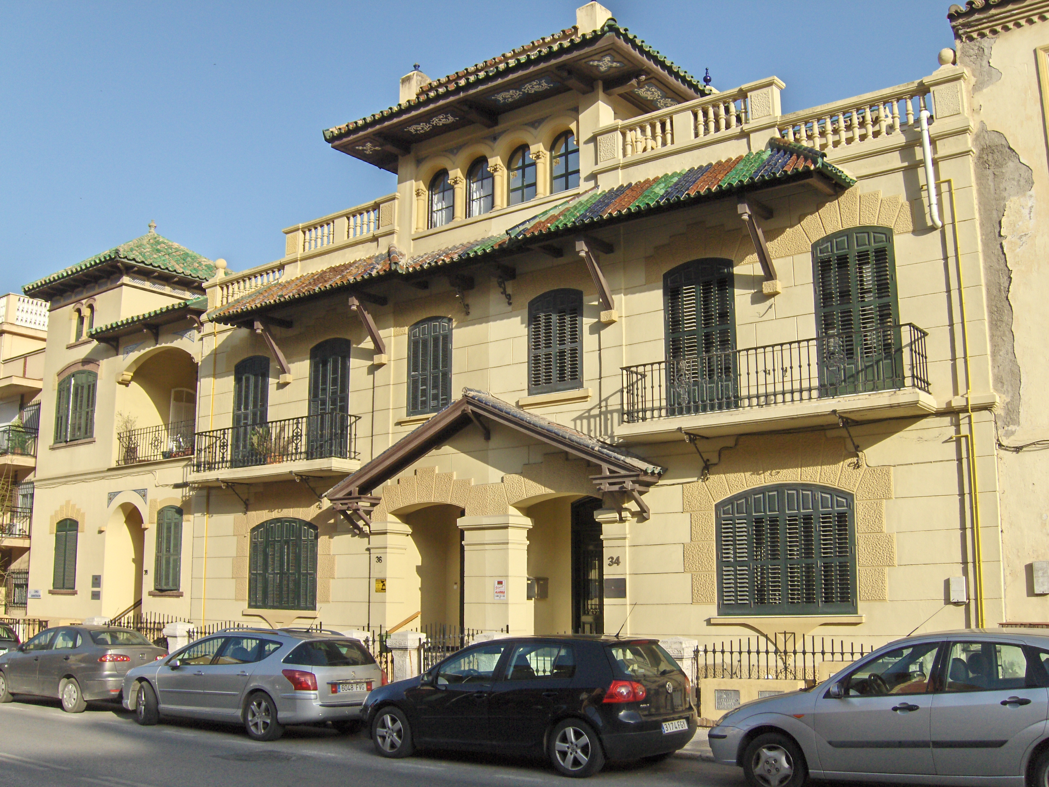 Viviendas en el Paseo de Sancha nos. 34 y 36, La Caleta, Málaga, España.